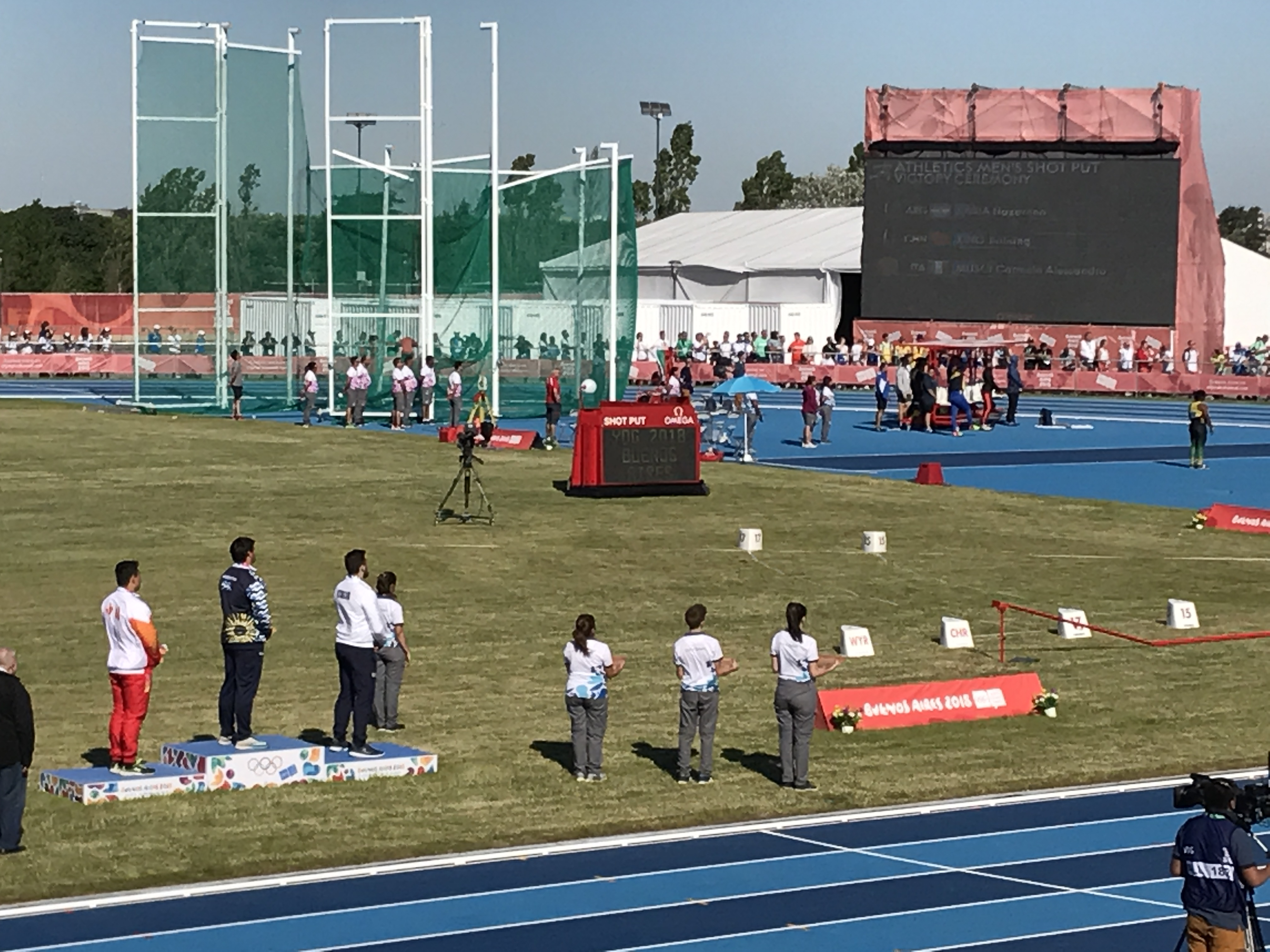 Cérémonie de remise des médailles lors des Jeux olympiques de la jeunesse de 2018 à Buenos Aires, lancer du poids, Argentin Sasia, Chinois Xing et Italien Musci